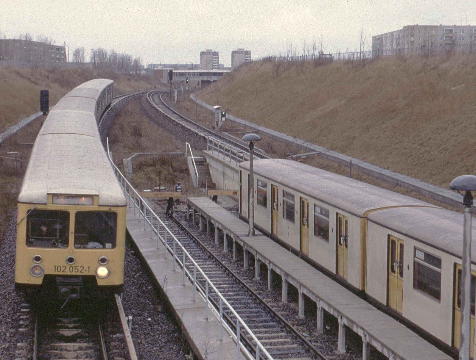 Triebwagen 102 051